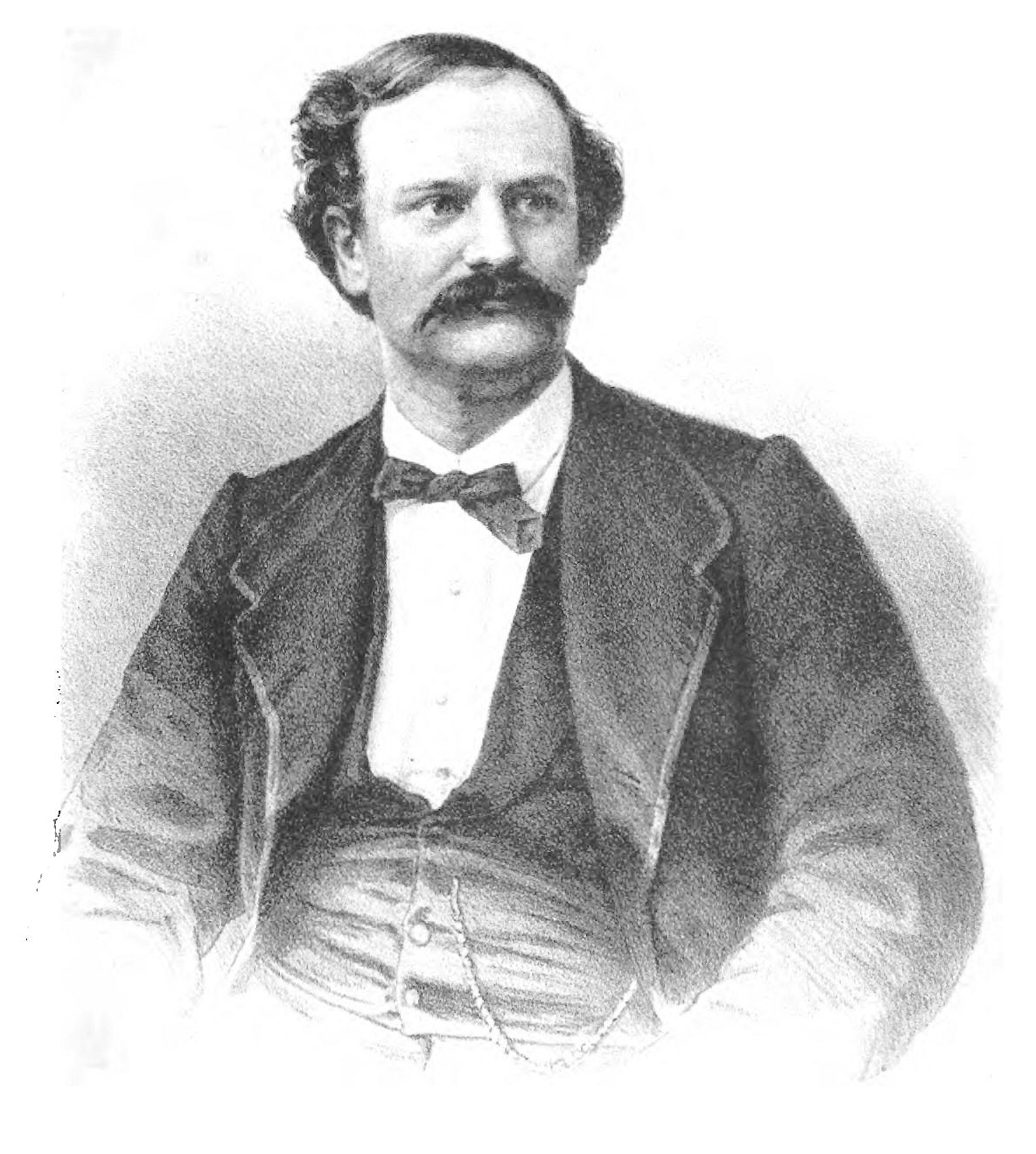 Anders Willman (1834-1898)